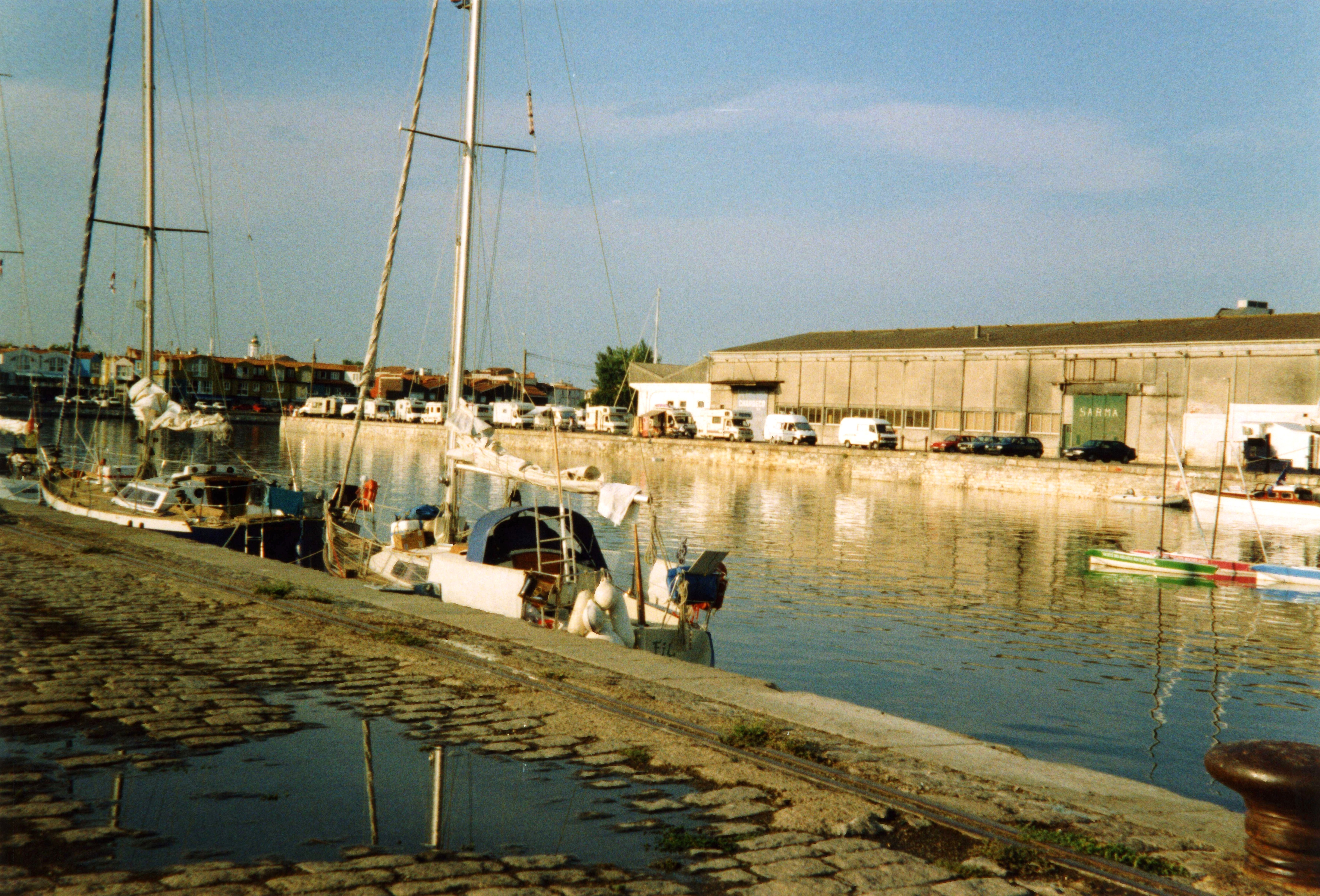 Le Bassin des Chalutiers du Port de La Rochelle avant sa transformation en bassin de navigation de plaisance. Les bateaux amarrés au quai sont en escale, plus loin, on distingue les camping cars de touristes qui sont venus visiter La Rochelle. La Rochelle, Charente Maritime, France.